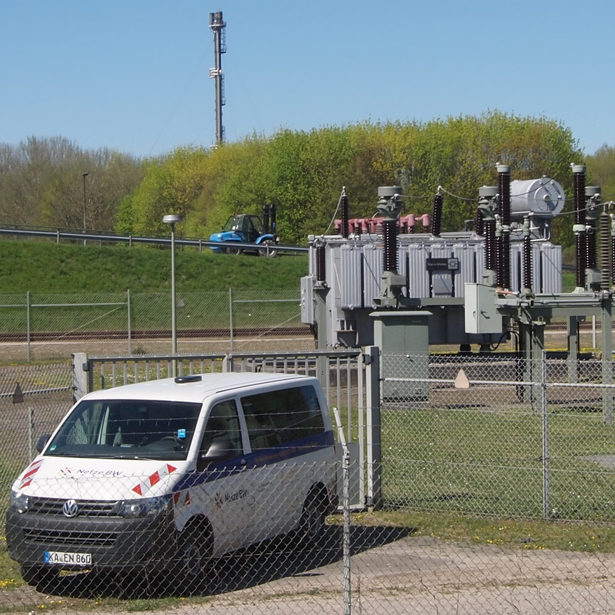 Fahrzeug der Netze BW beim Umspannwerk links der Alb der Mineralölraffinerie Oberrhein